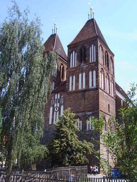 Nikolaikirche Luckau, Land Brandenburg, Deutschland Bild aufgenommen am 25.6.2006 durch Olaf Meister